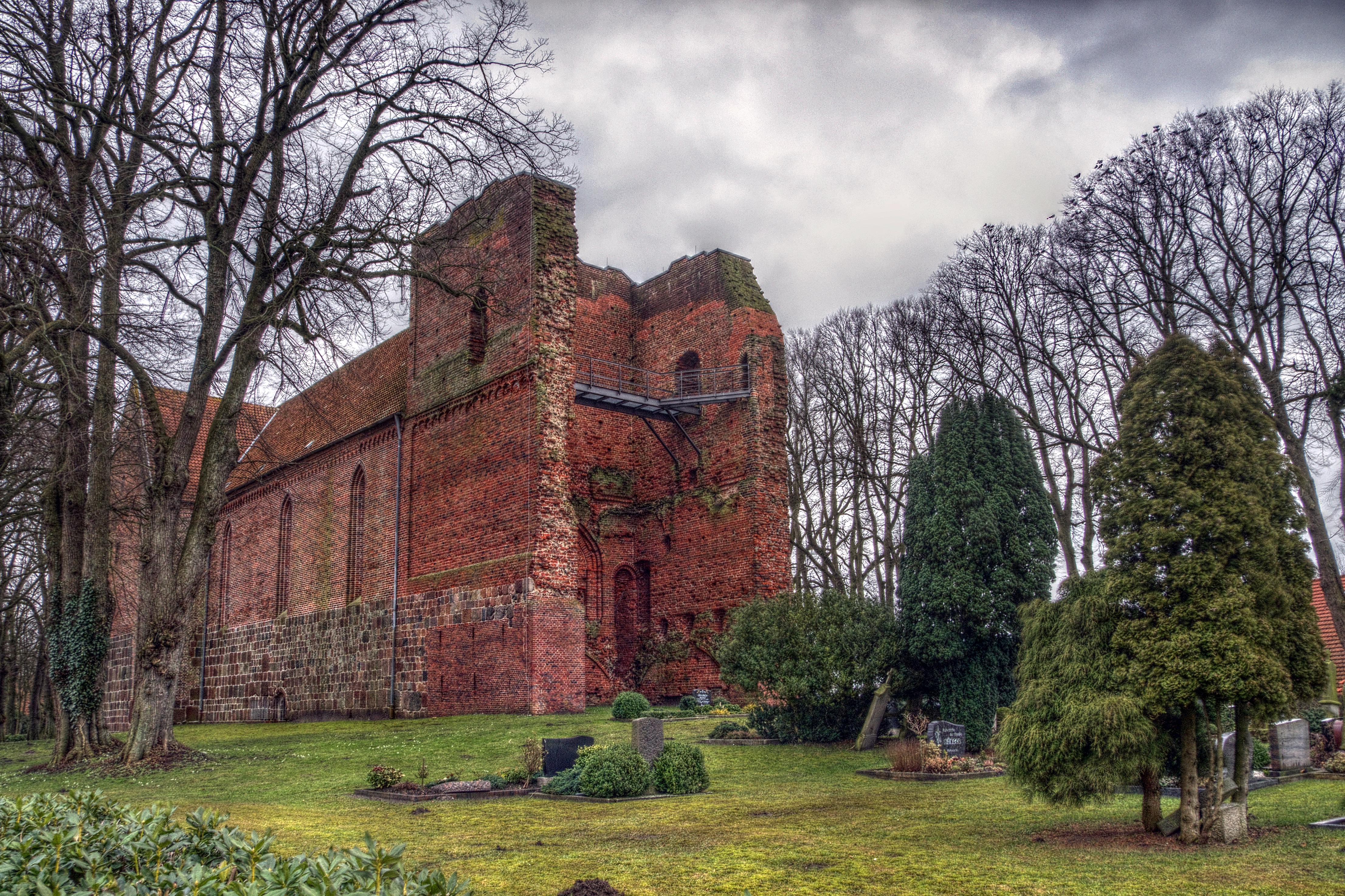 Turmruine der Kirche St. Mauritius in Reepsholt